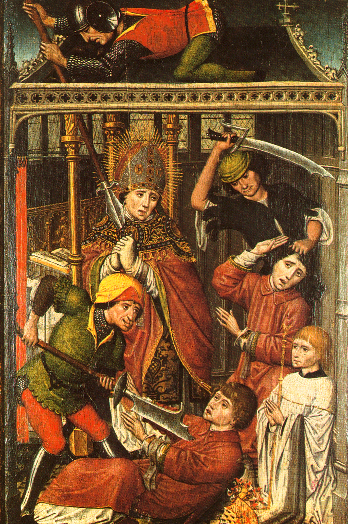 Le martyre de saint Lambert représenté sur un panneau peint du XVème siècle